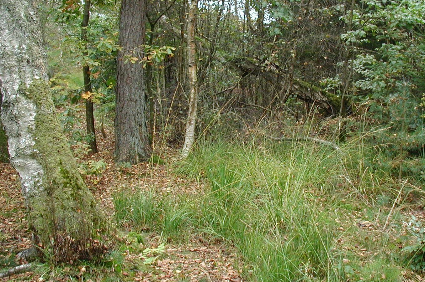 Swamp forest near Silkeborg, Denmark.